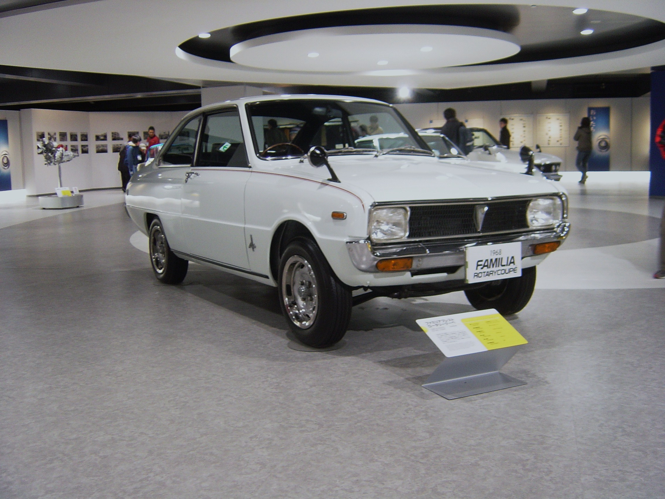 Mazda FAMILIA(マツダ・ファミリア),Mazda Museum